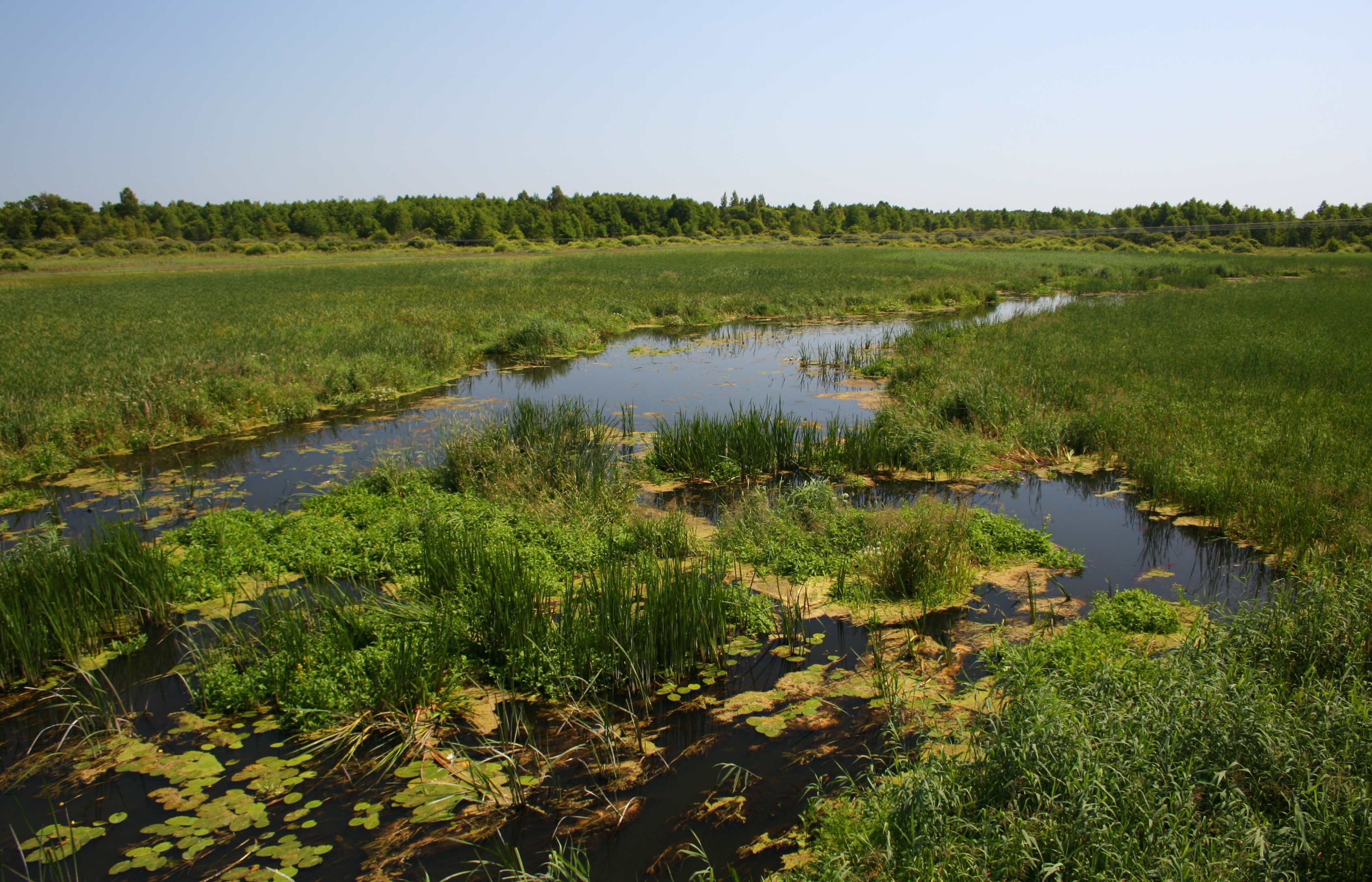 Biebrza przepływająca przy drodze do Lipska - widok z mostu